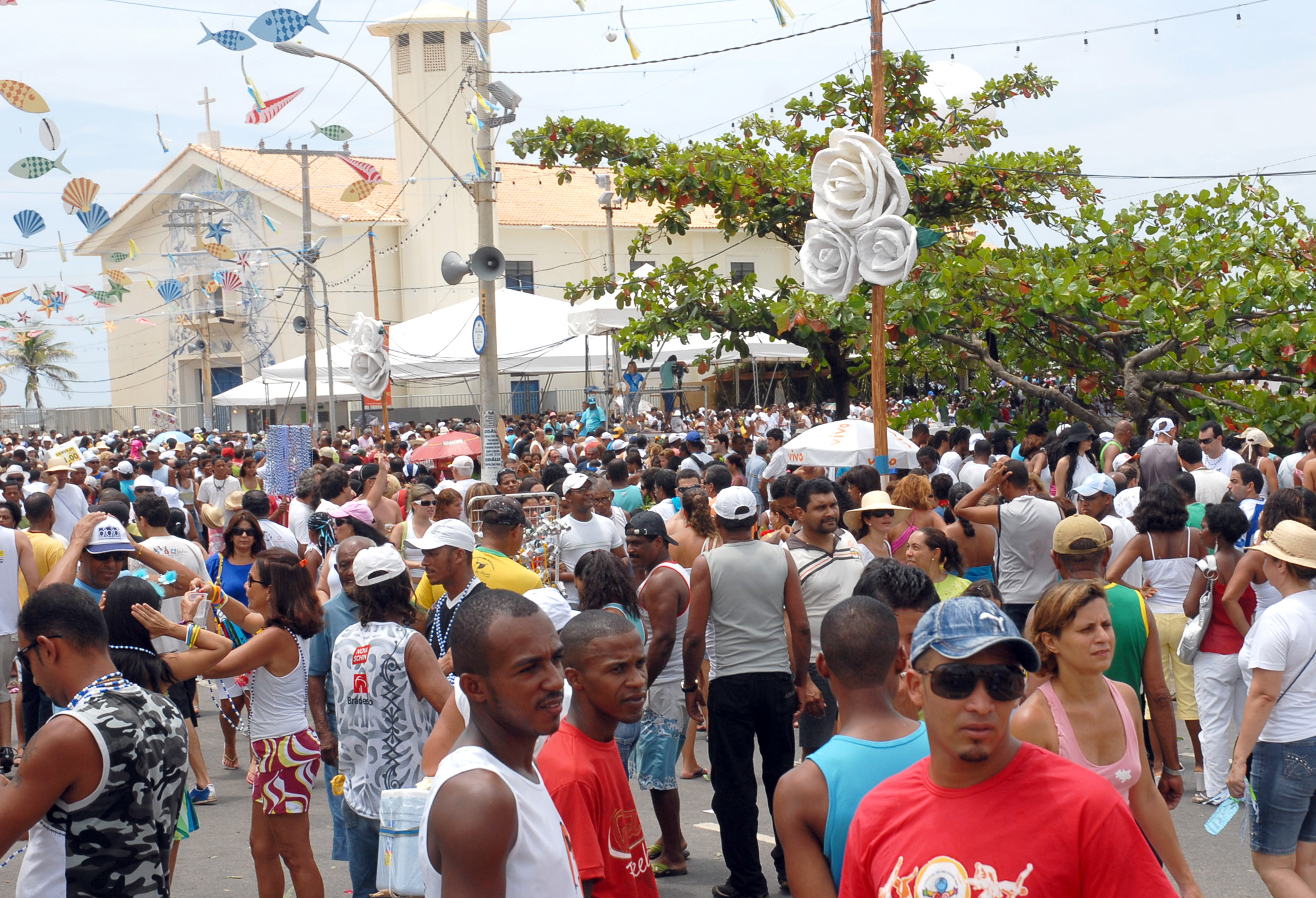 Salvador - Milhares de fiéis e turistas participam da festa de Iemanjá, na Praia do Rio Vermelho, em 2008.